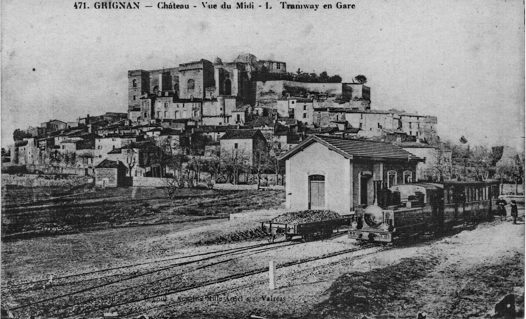 Carte postale ancienne éditée par Revoul, n°471 GRIGNAN (Drôme) : Château - Vue du Midi - Tramway en gare Gros plan de la gare de la Compagnie du Chemin de fer Taulignan-Grignan-Chamaret (ligne exploitée de 1907 à 1928), avec une rame tractée par la locomotive n°1